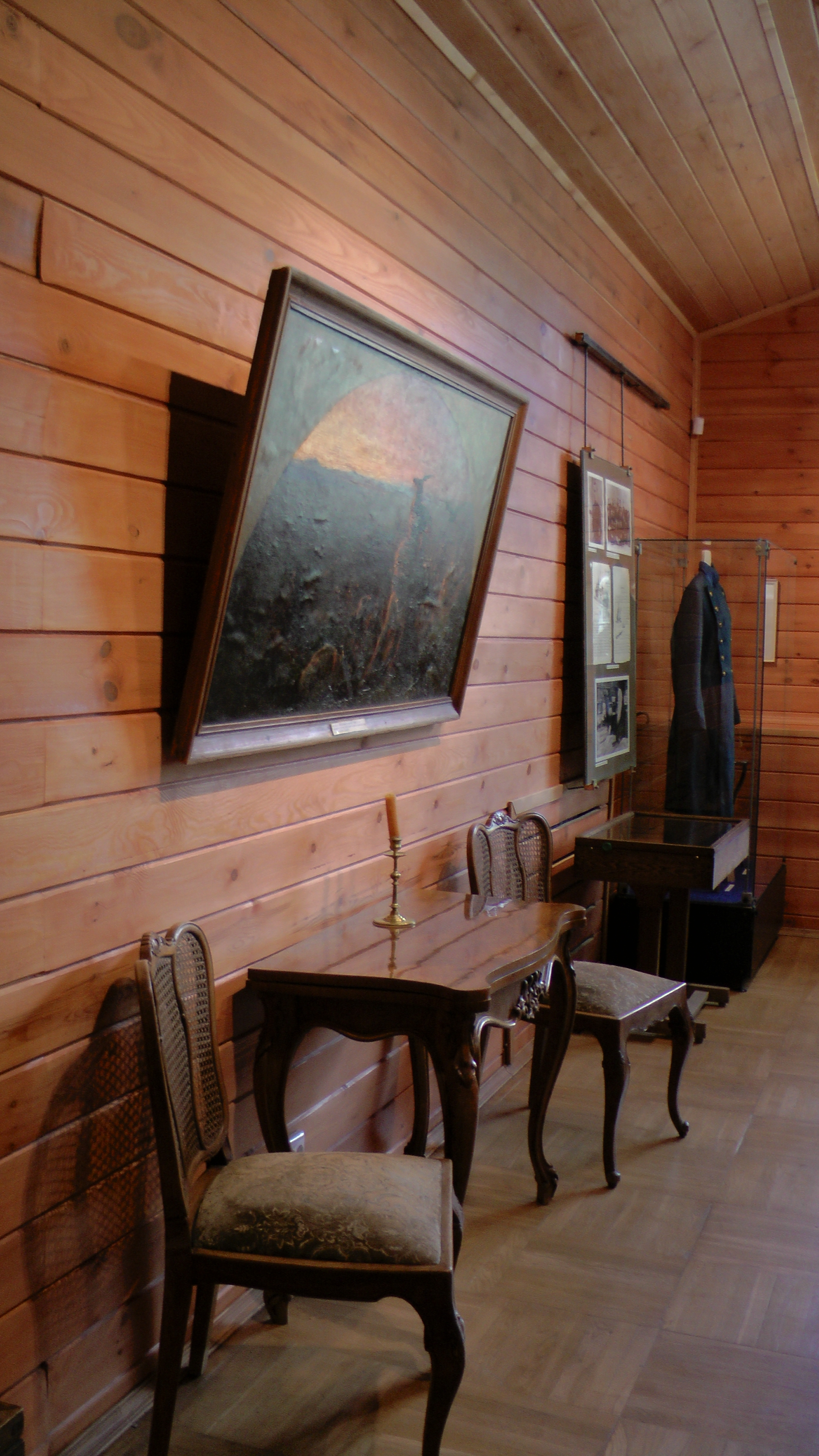 Мезонин в усадьбе Рерихов в Изваре